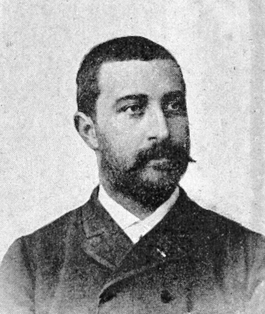 "Henriot (Henry Maigrot)".